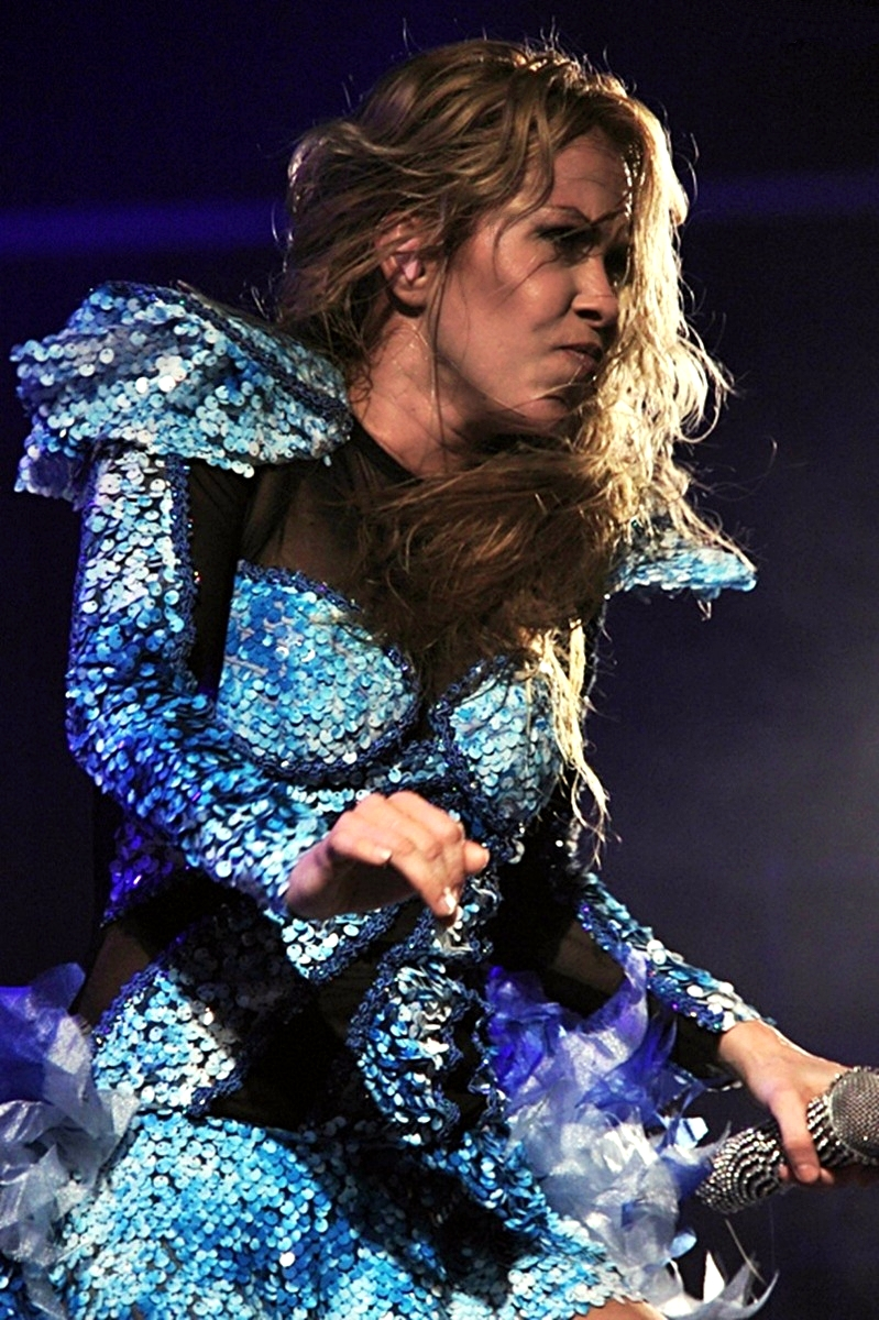 Joelma durante o Festival Baía das Gatas em Cabo Verde.